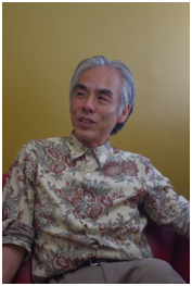 吉岡正人本人の画像